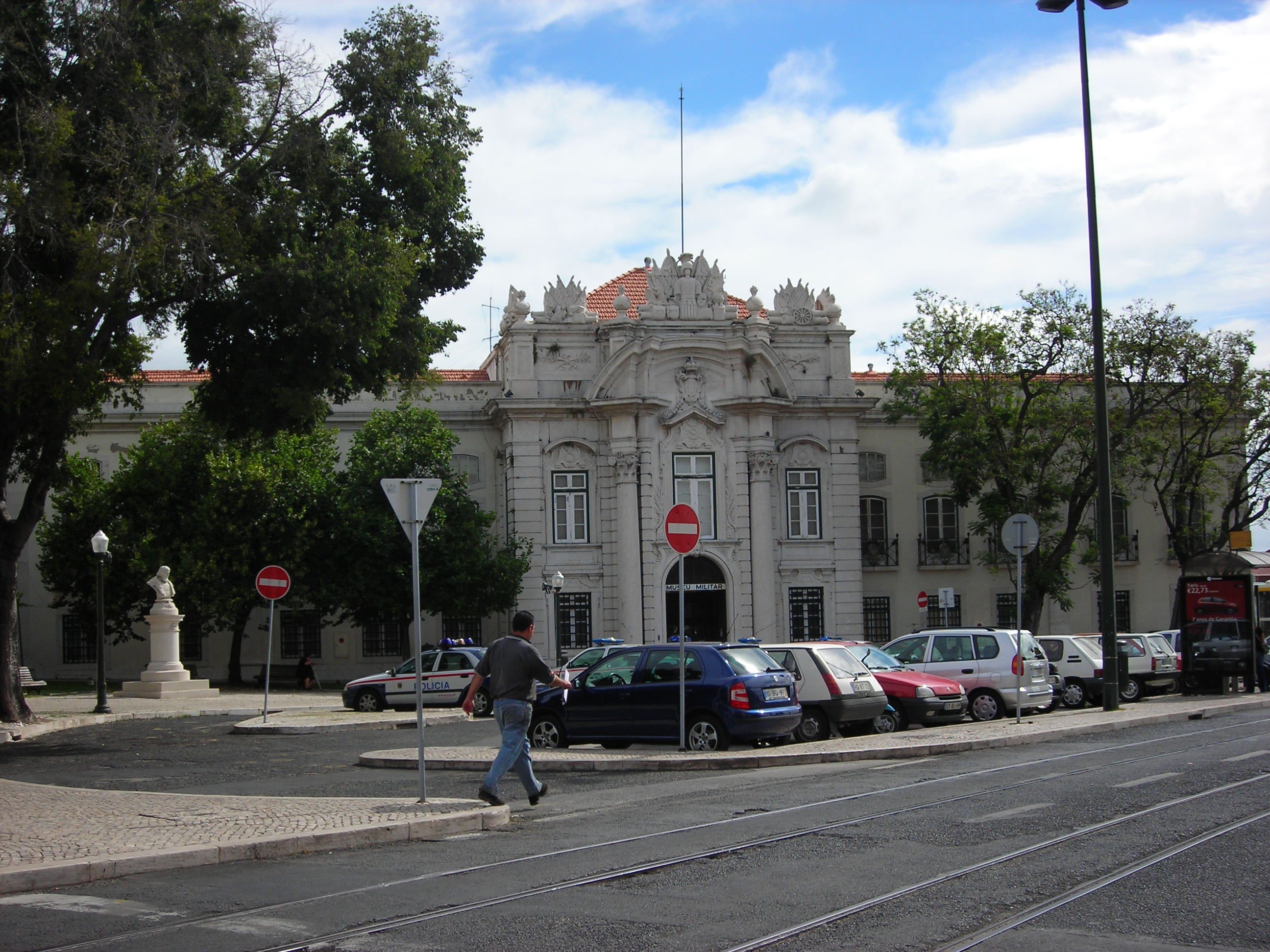 Largo do Museu da Artilharia e Museu Militar de Lisboa